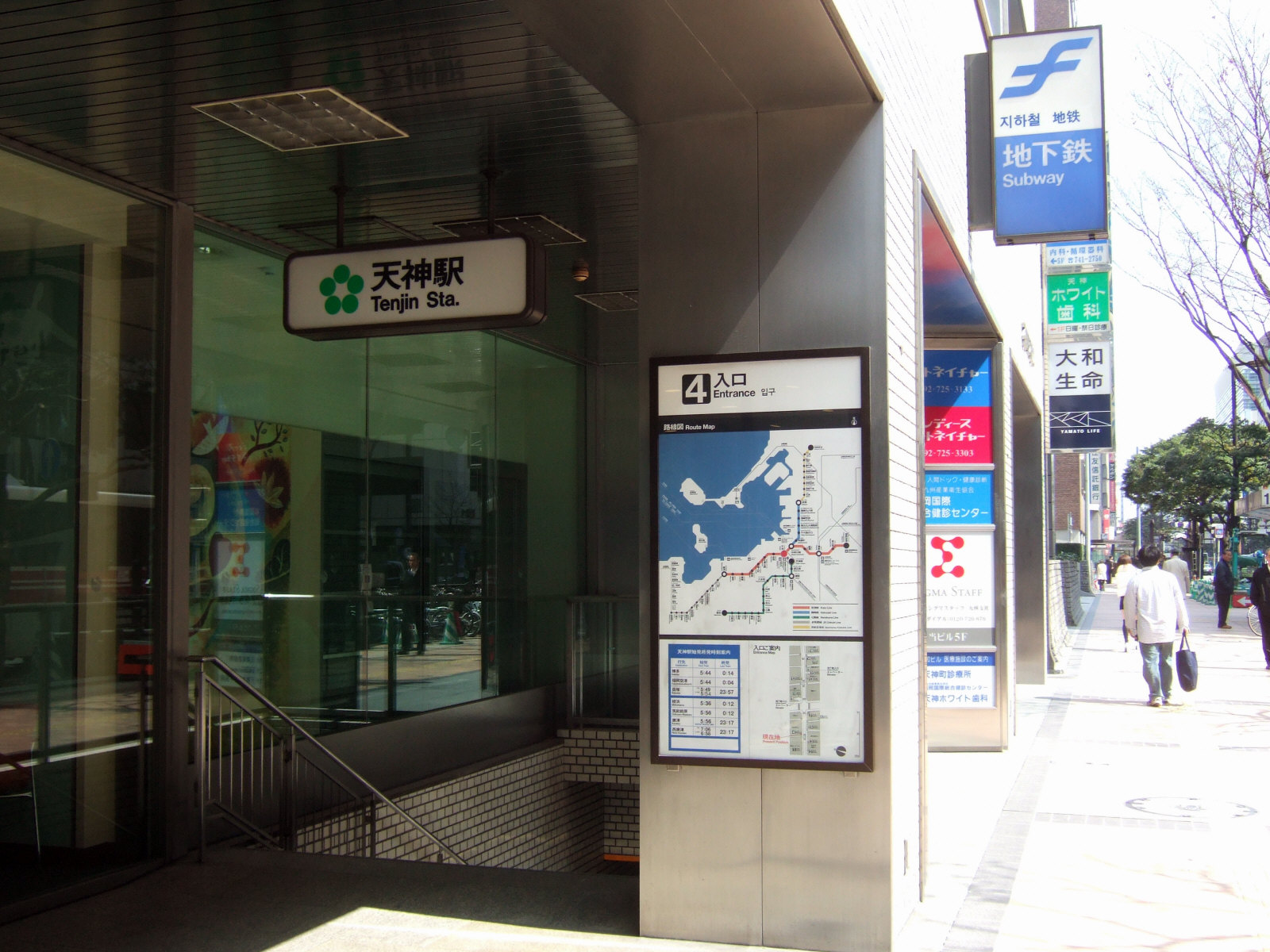 福岡市地下鉄天神駅入口（4番）Fukuoka City Subway Tenjin Station